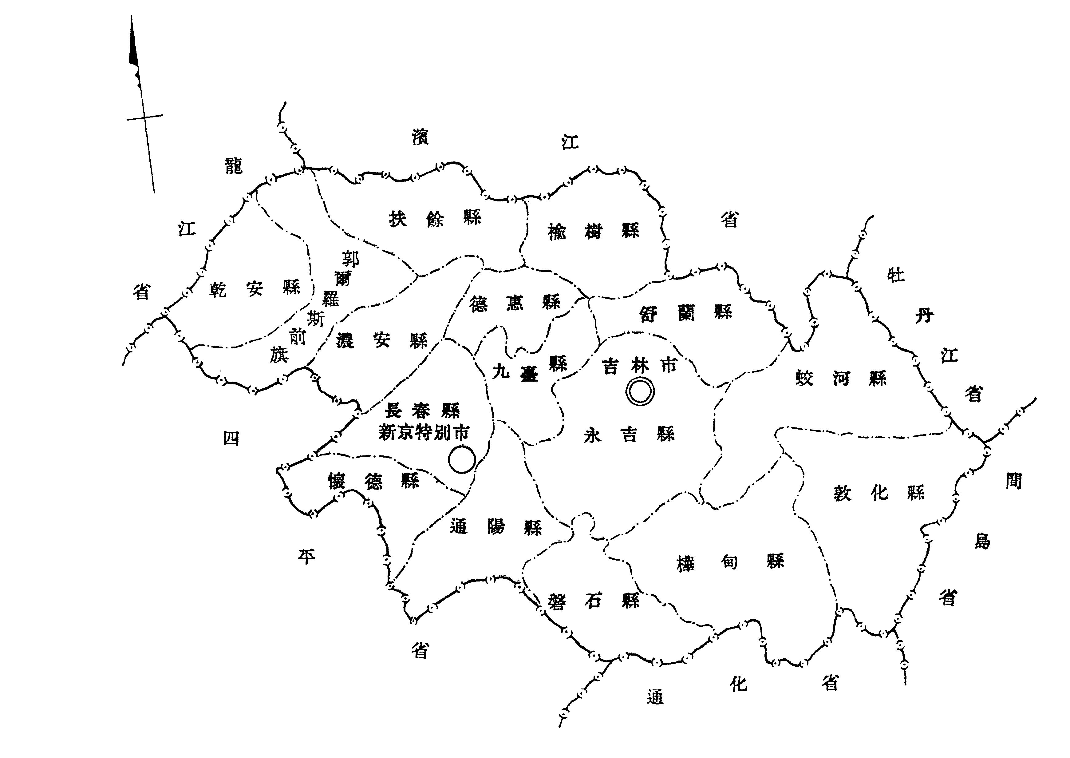 国務院総務庁臨時国勢調査事務局『康徳7年 臨時国勢調査報告』「第二巻 地方編 1 新京特別市 2 吉林省」第三図「吉林省市県旗別人口密度」を加工